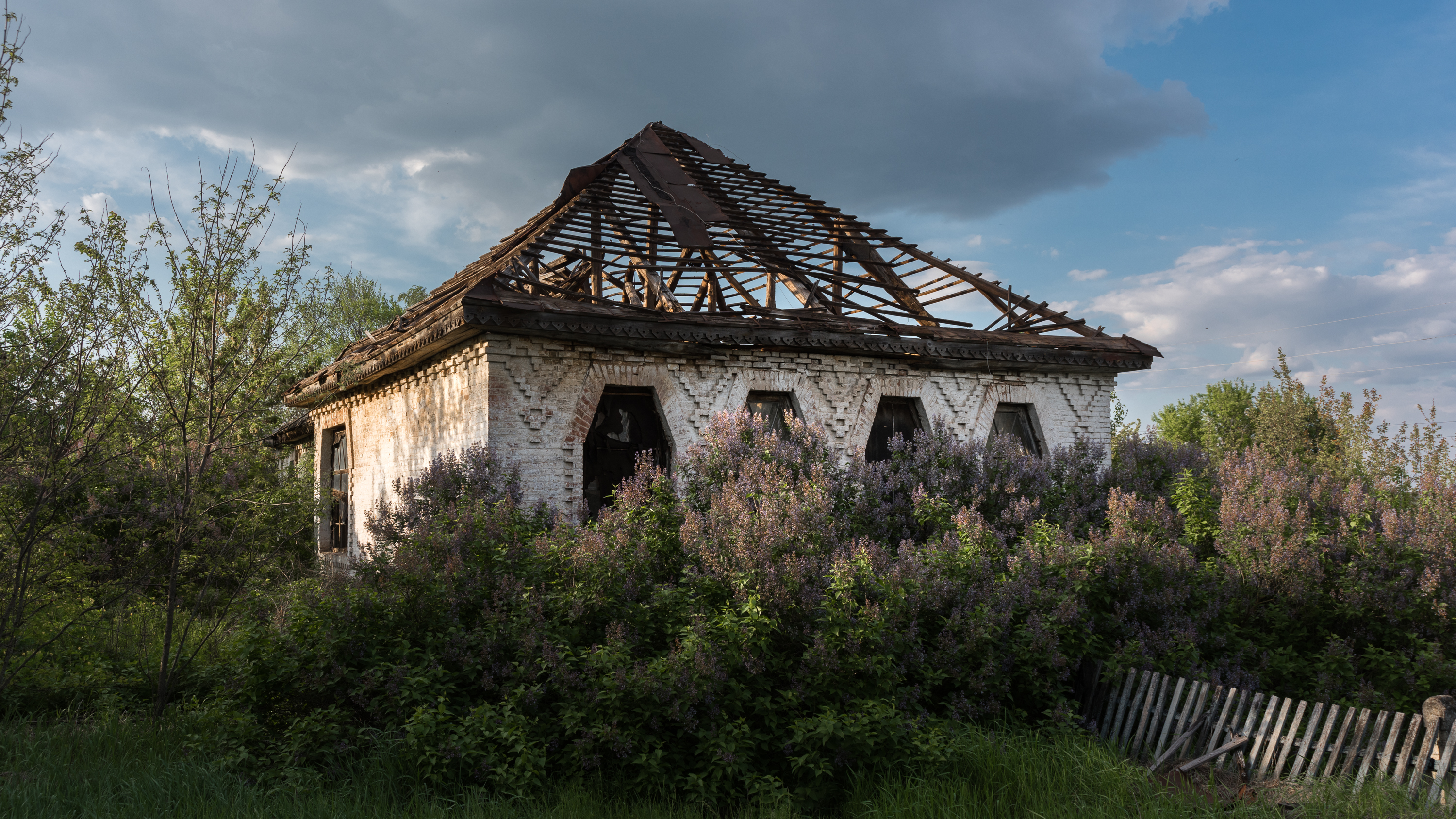 Однокомплектна земська школа в селі Рудка Лохвицького району Полтавської області. Архітектор Опанас Сластьон.